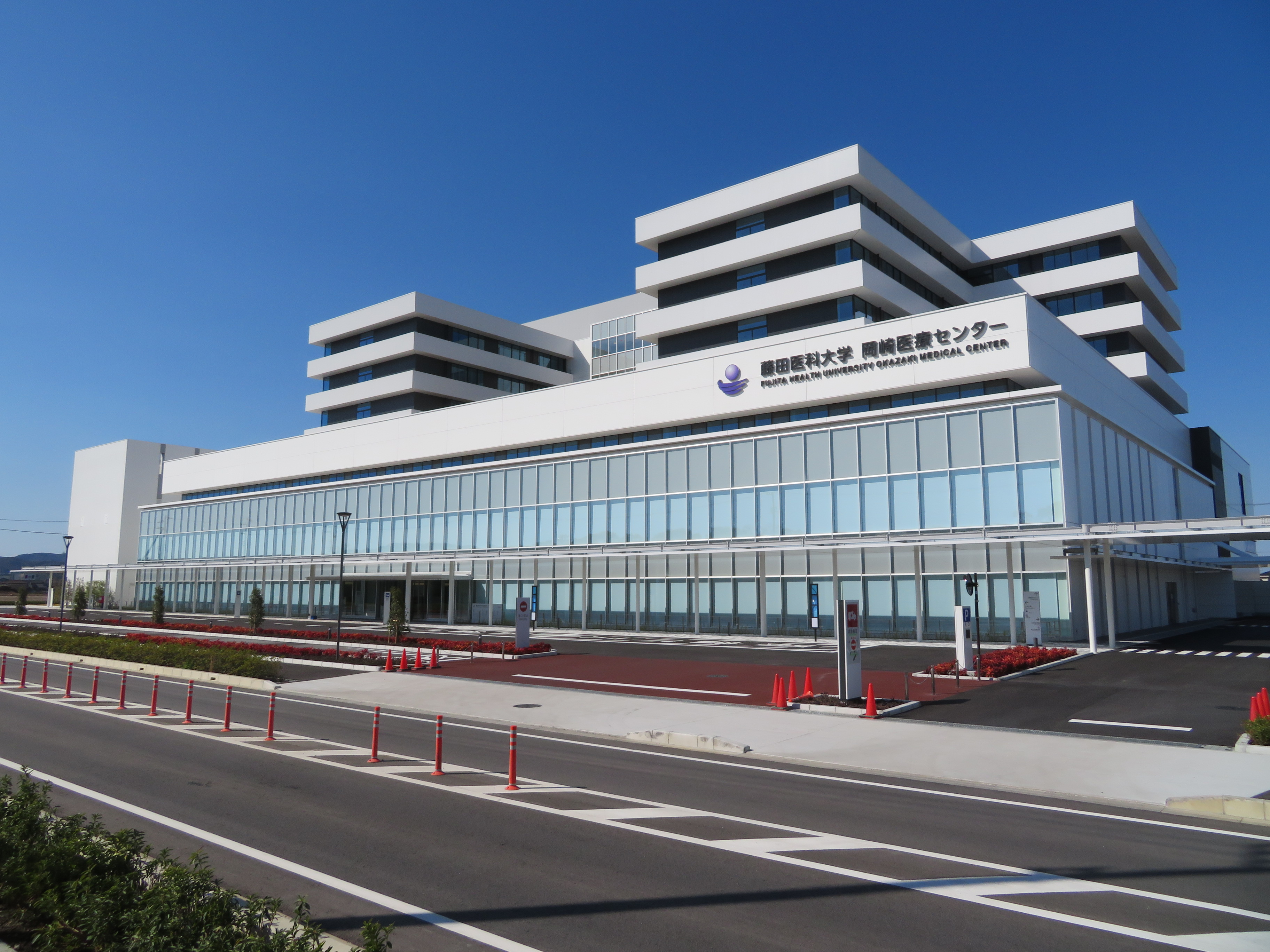 藤田医科大学岡崎医療センター（岡崎市針崎町）